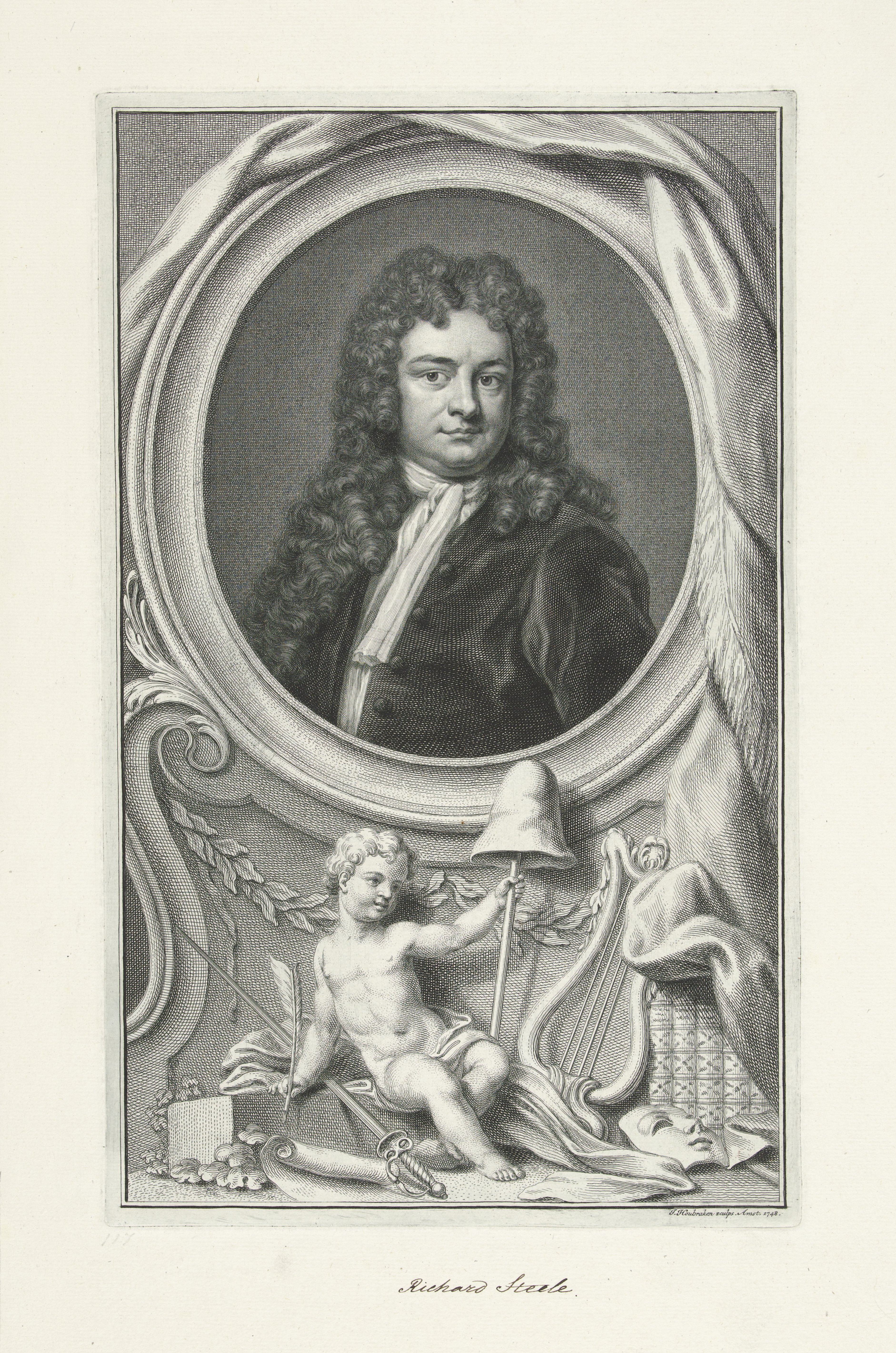 IdentificatieTitel(s): Portret van Richard SteeleObjecttype: prent Objectnummer: RP-P-OB-48.231Catalogusreferentie: Ver Huell 1051(2)Opmerking: 2 staten bekendOpschriften / Merken: verzamelaarsmerk, verso linksonder, gestempeld: Lugt 240naam, recto midden onder, handgeschreven: ‘Richard Steele’Omschrijving: Portret van de schrijver Richard Steele. Onder het portret een putto met een vrijheidshoed op een stok in zijn ene en een schrijfveer in zijn andere hand. Naast hem liggen een zWaar: d, boeken, een lier en een masker.VervaardigingVervaardiger: prentmaker: Jacob Houbraken (vermeld op object)naar schilderij van: Gottfried KnellerPlaats vervaardiging: AmsterdamDatering: 1748Fysieke kenmerken: ets, gravure en pen; proefdrukMateriaal: papier Techniek: etsen / graveren (drukprocedé) / penAfmetingen: plaatrand: h 350 mm × b 218 mmToelichtingPrent ook gebruikt in: Thomas Birch. The heads of illustrious persons of Great Britain : engraved by Houbraken, and Vertue, with their lives and characters. London: John en Paul Knapton, 1743-1751.OnderwerpWat: Freedom, Liberty; 'LibertÃ ' (Ripa) (+ symbolical representation of concept)quilllyre, cithara, psalteryWie: Richard SteeleVerwerving en rechtenVerwerving: overdracht van beheer 1816Copyright: Publiek domein